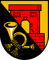 Gemeinde Unken: Schrägrechtsgeteilter Schild; oben in Gold aus der Teilung ragend auf roter Quermauer ein roter Torbau mit zwei Blindfenstern; unten in Schwarz ein schrägrechtes goldenes Posthorn mit linksgerichtetem Mundstück, schwarzgoldener Umschnürung samt ebensolchen zwei Quasten.